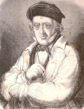 Natale Schiavoni